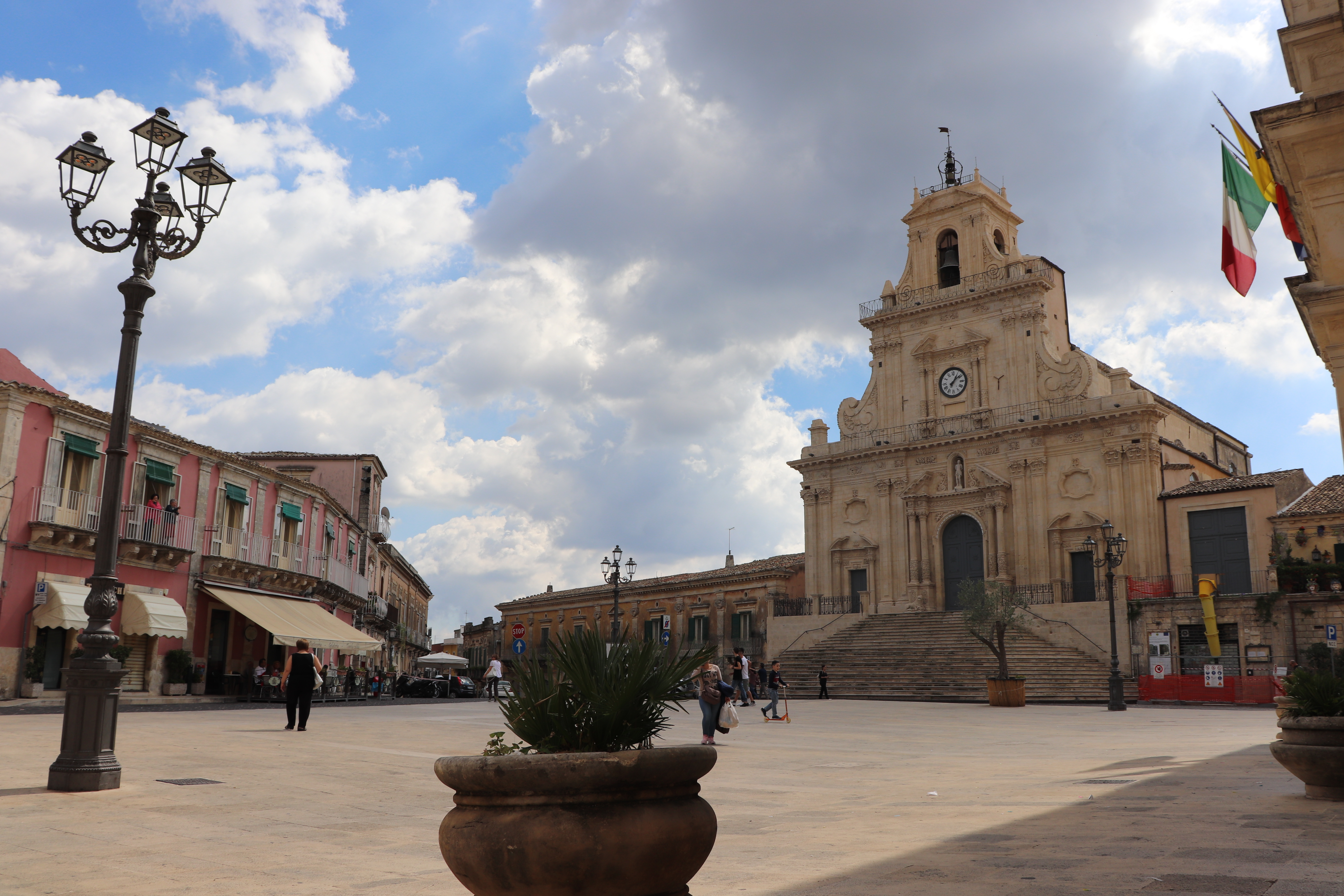 Piazza del Popolo, punto di vista via carlo alberto This is a photo of a monument which is part of cultural heritage of Italy.